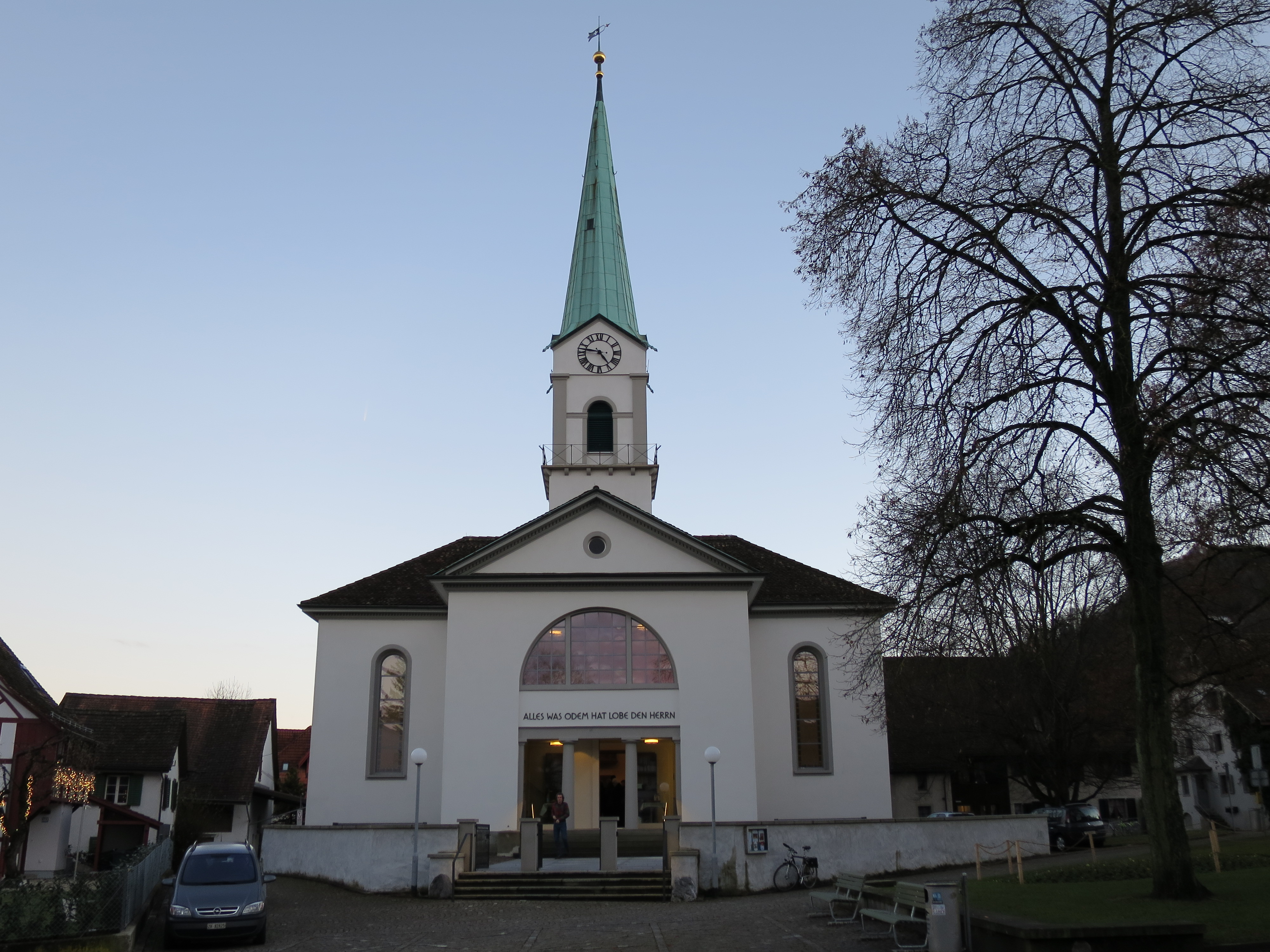 Hauptfassade